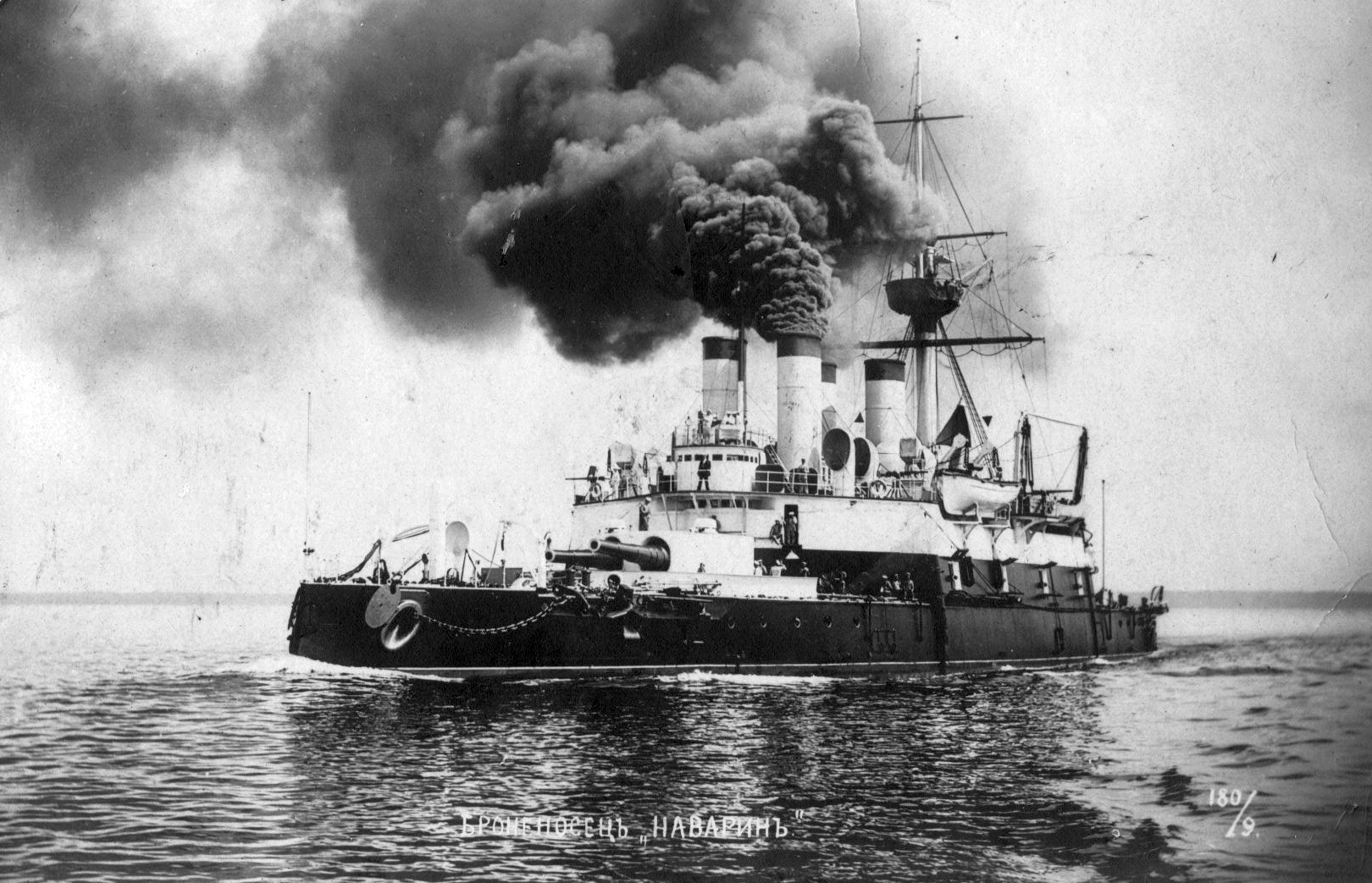 Az orosz cári haditengerészet Navarin páncélosa. Tags: ship, military, warship, steamboat Title: Az orosz cári haditengerészet Navarin páncélosa.